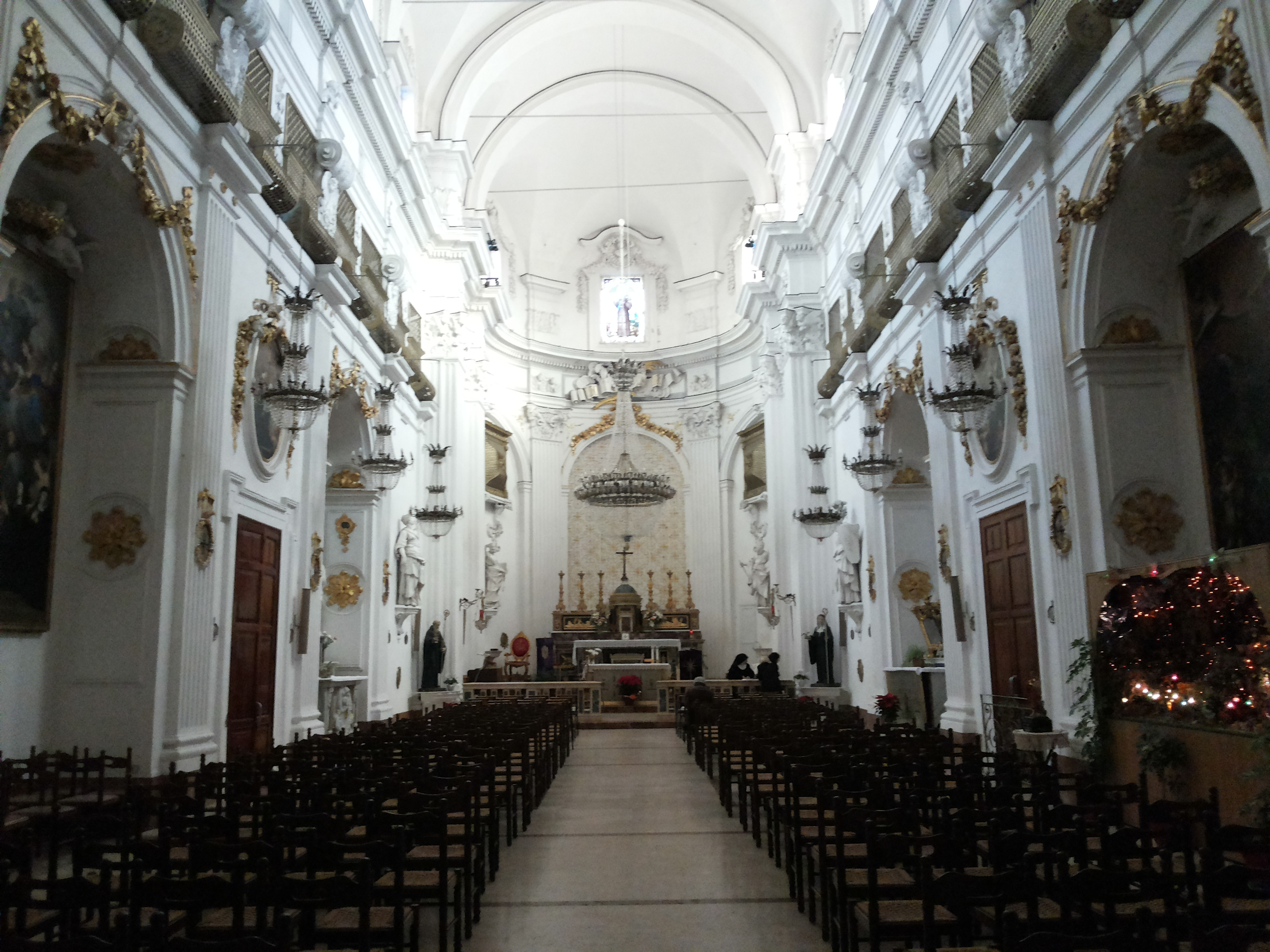 Interno della Badia Nuova di Alcamo